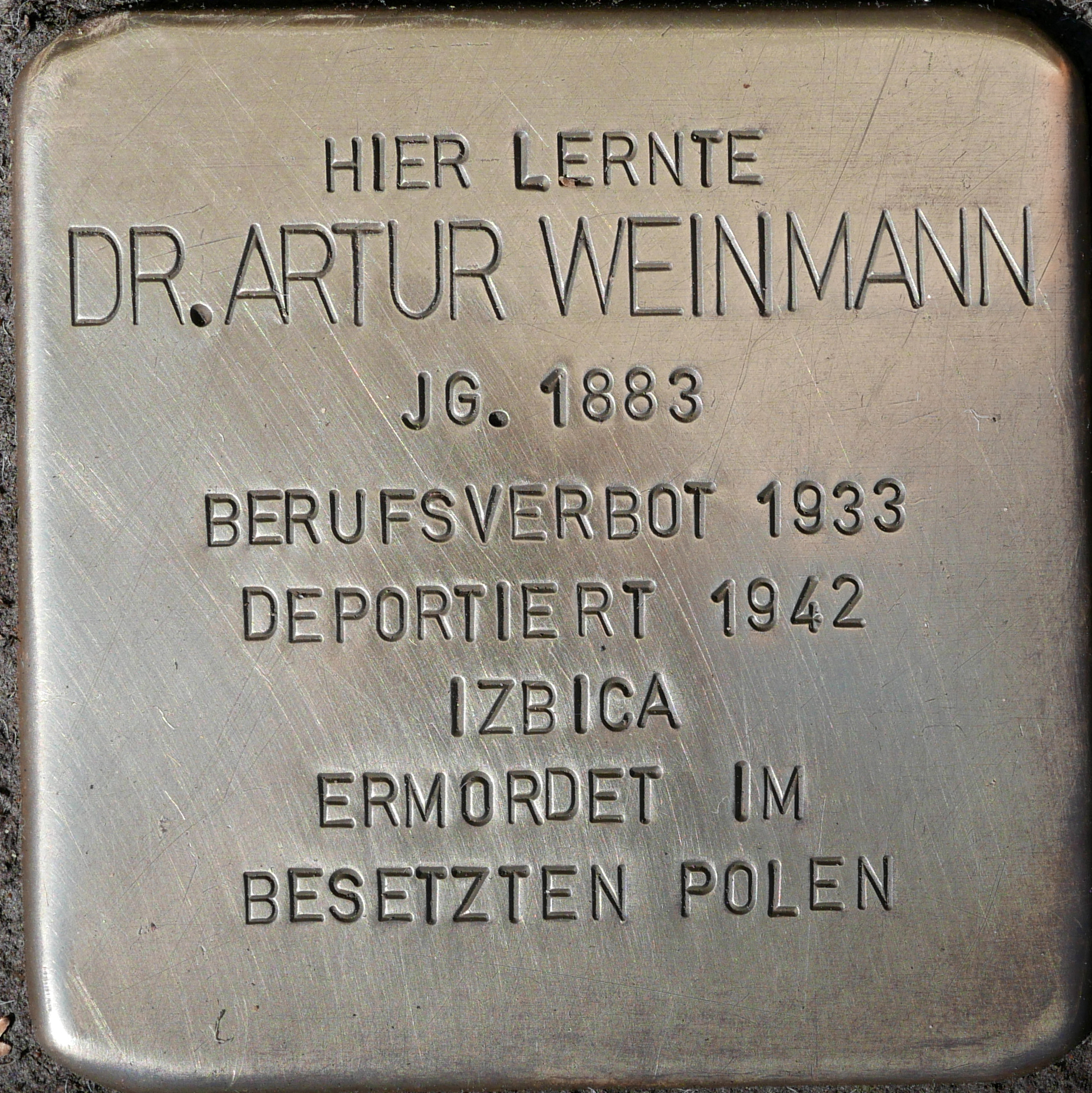 Stolpersteine Köln, Gymnasium Kreuzgasse, Stolperstein für Artur Weinmann